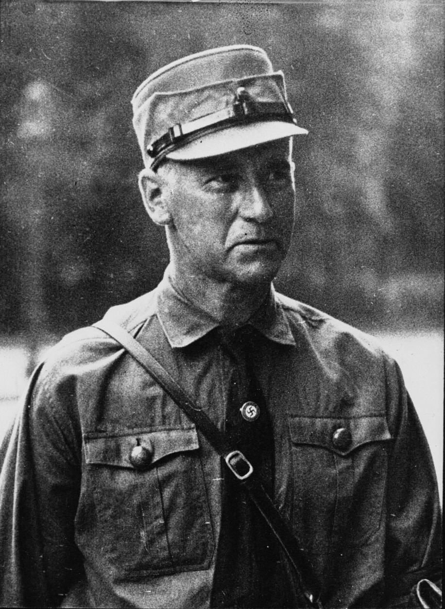 El doctor Frick, ministro del Interior en el gabinete de Hitler, 1933.